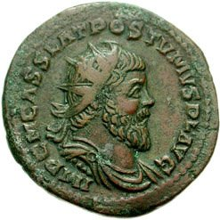 Portret van keizer Postumus op een dubbel-sestertie (34mm diameter, 20.76g) geslagen in Keulen in 261.